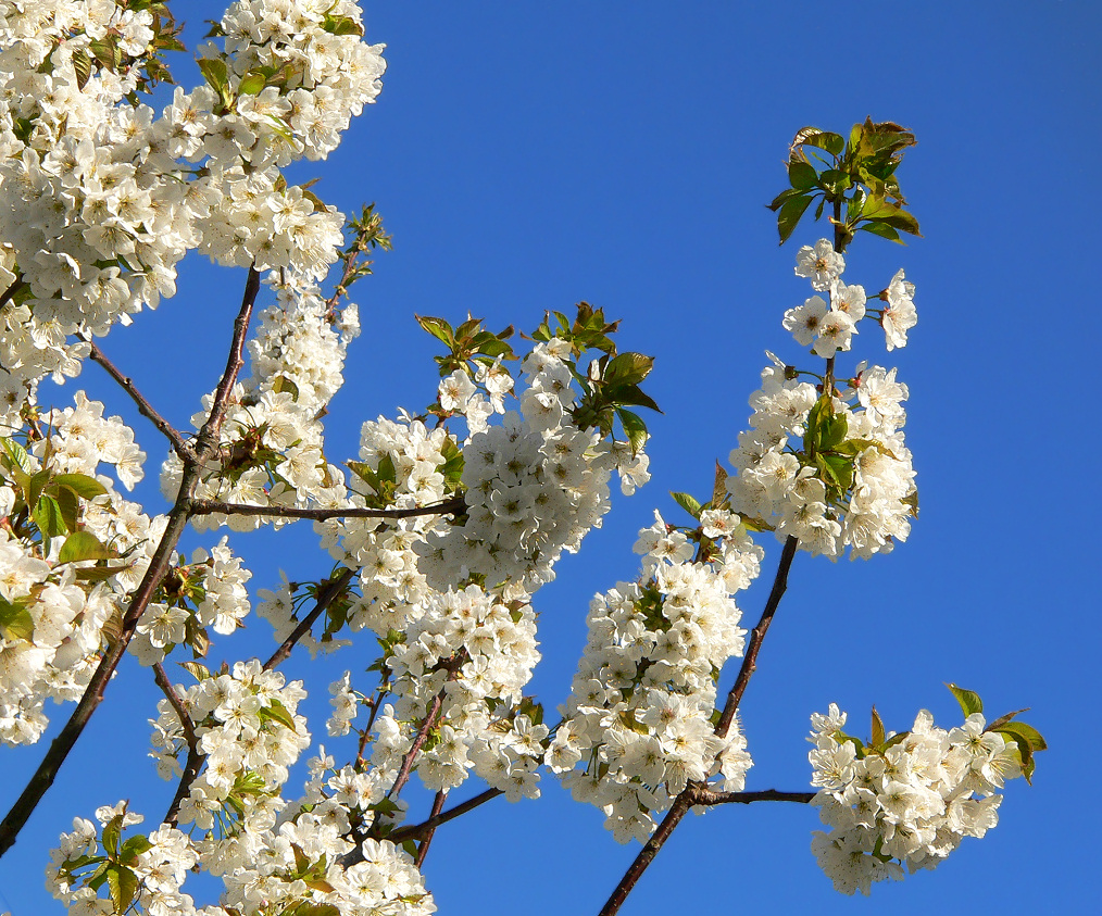 Süßkirschenblüten